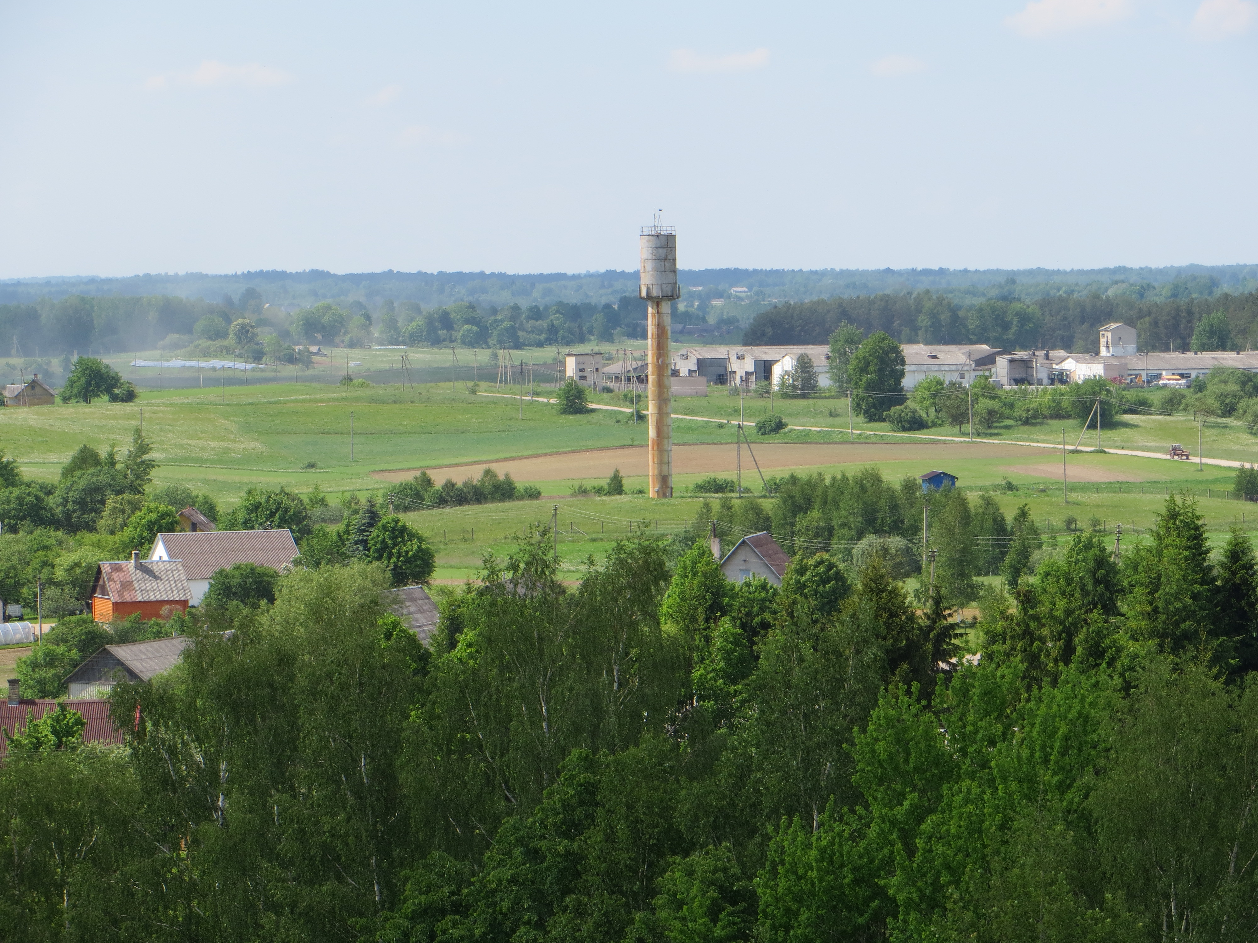 Joniškis, Lithuania